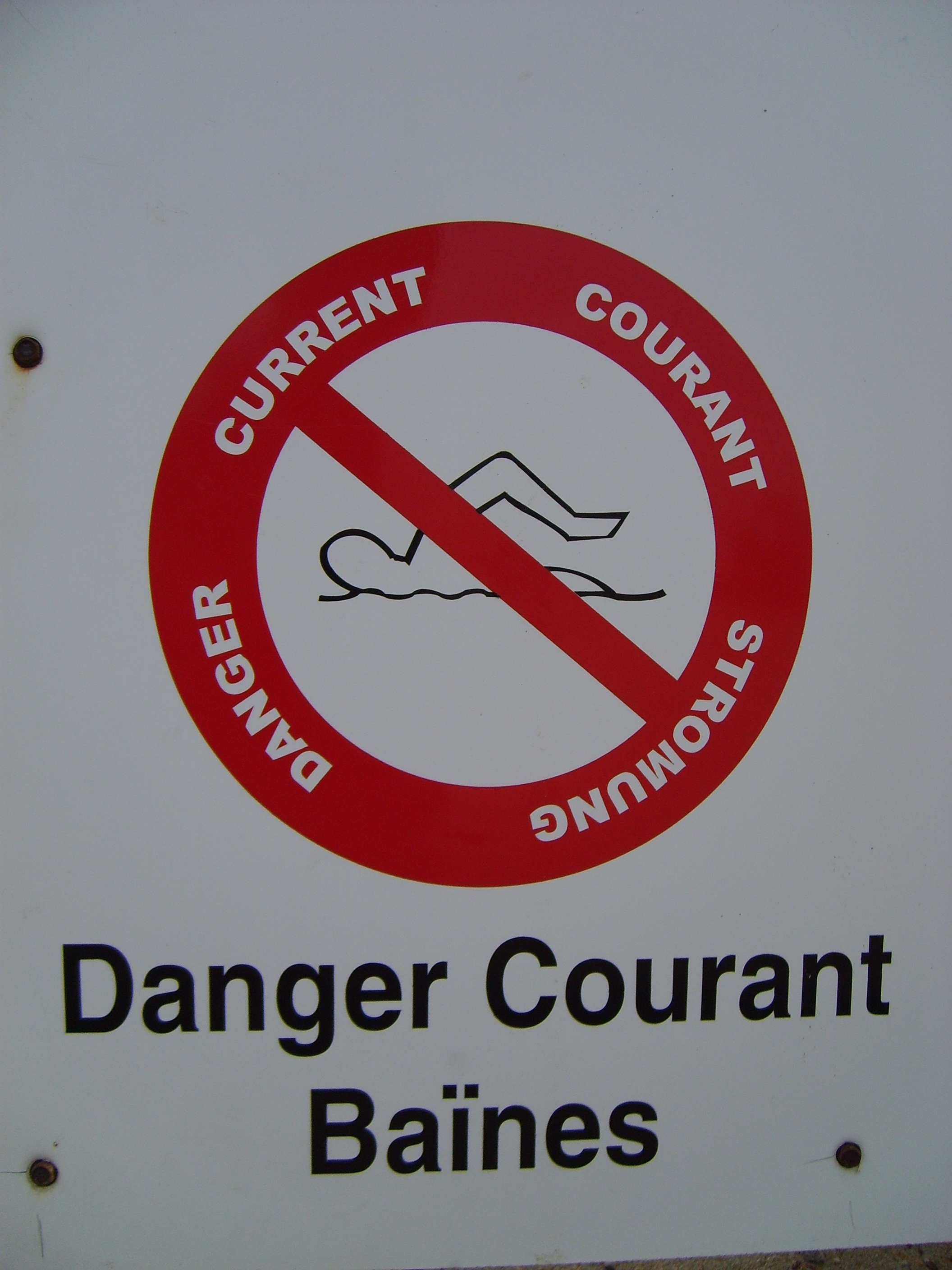 Panneau danger courant baïnes à Montalivet (Gironde, France).